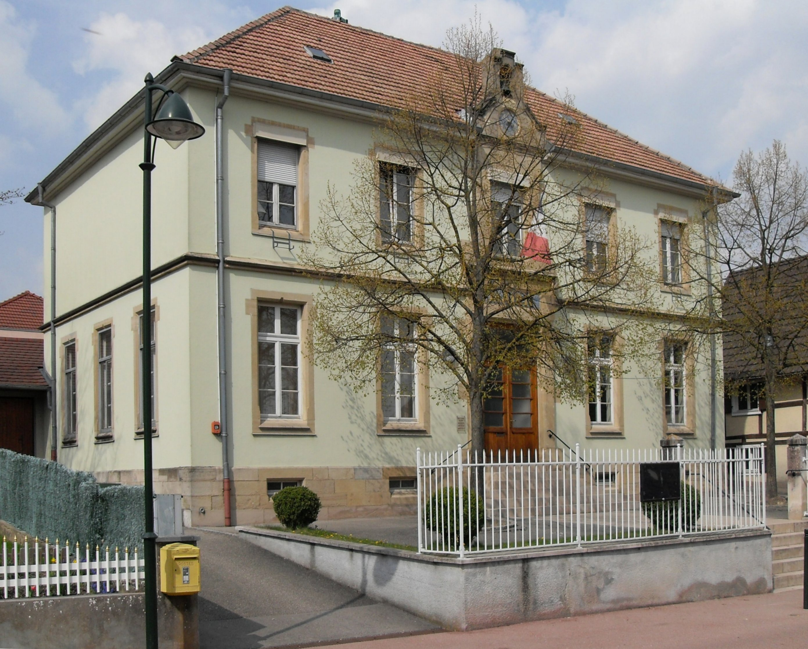 La mairie de Stetten